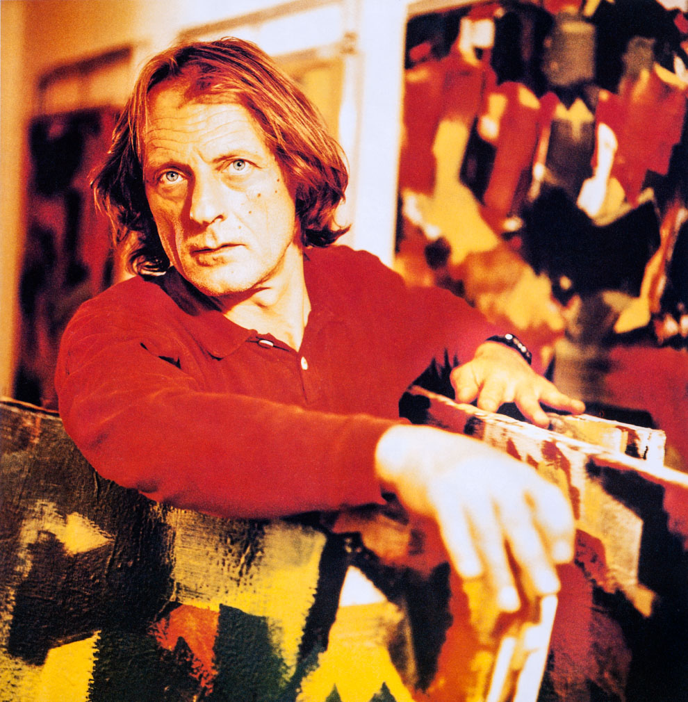 Franz Jenull mit seinen Gemälden